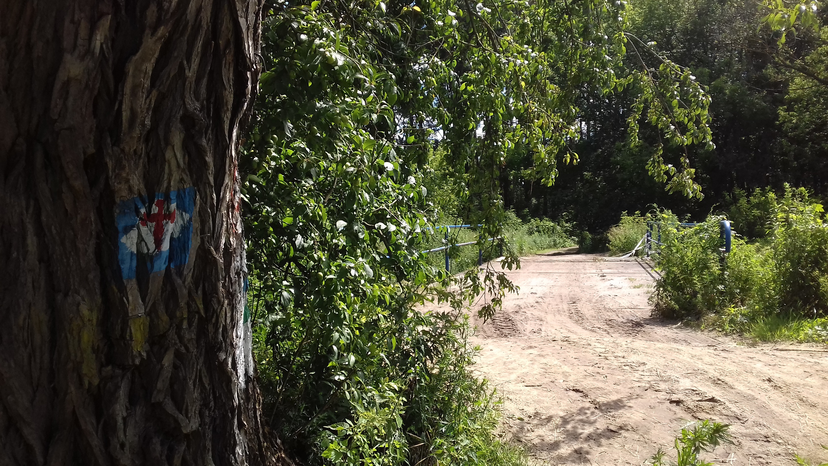 Oznaczenie Wielkopolskie Drogi Świętego Jakuba w pobliżu mostu przez Kanał Mosiński pomiędzy Mosiną a Rogalinkiem.